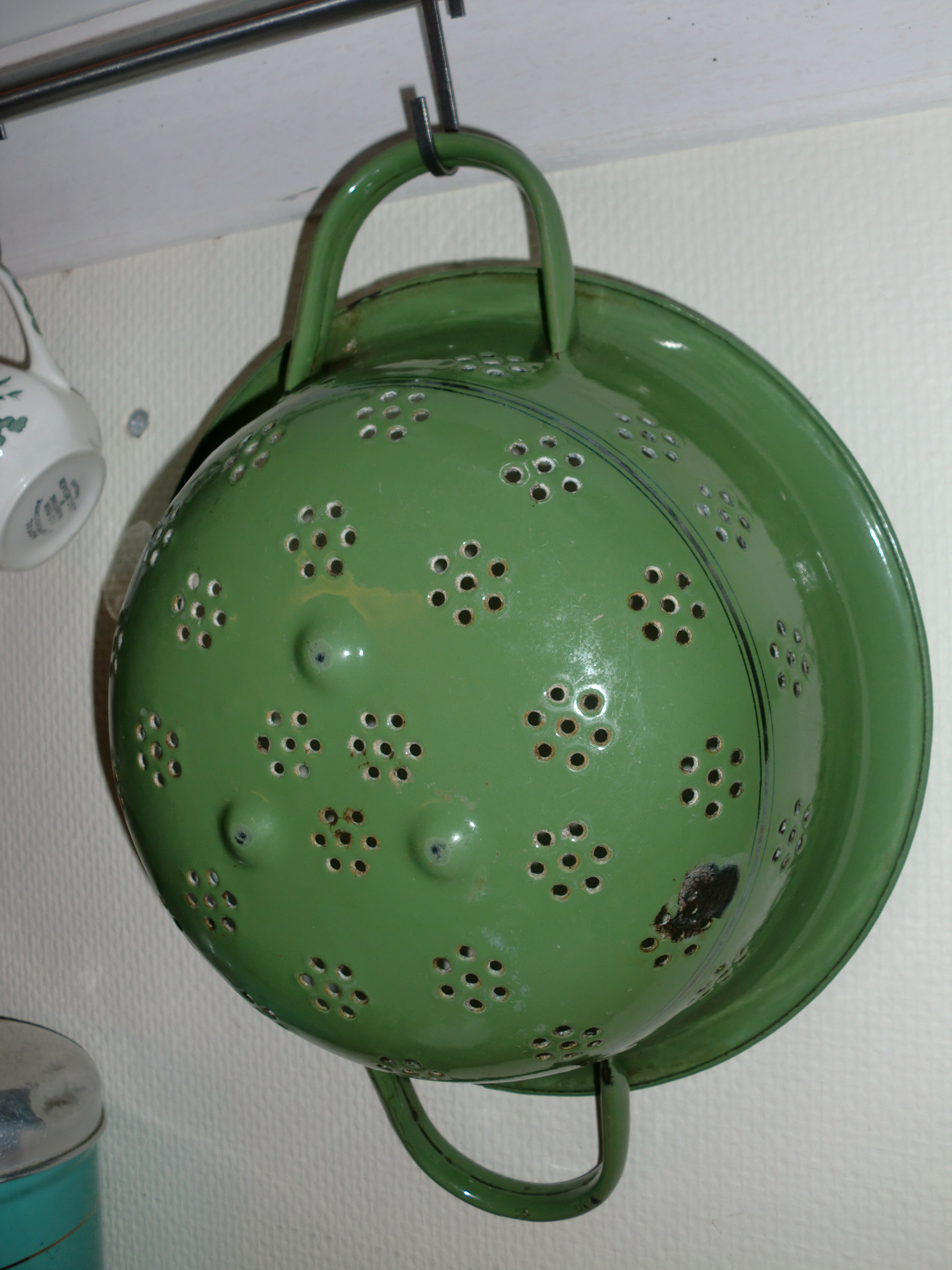 Vergiet van emaille, Nederlands jaren 50.